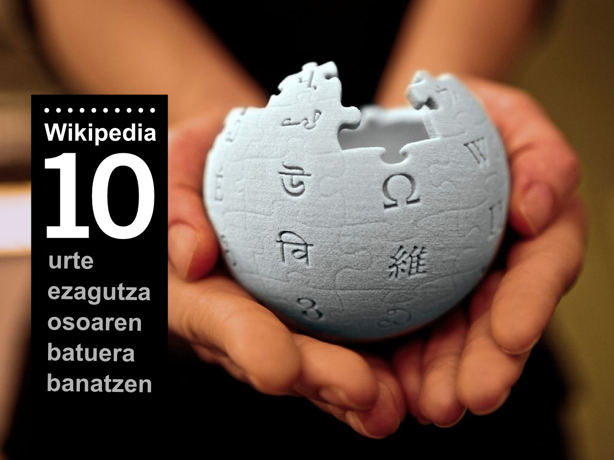 10yrs carry-our-message eu